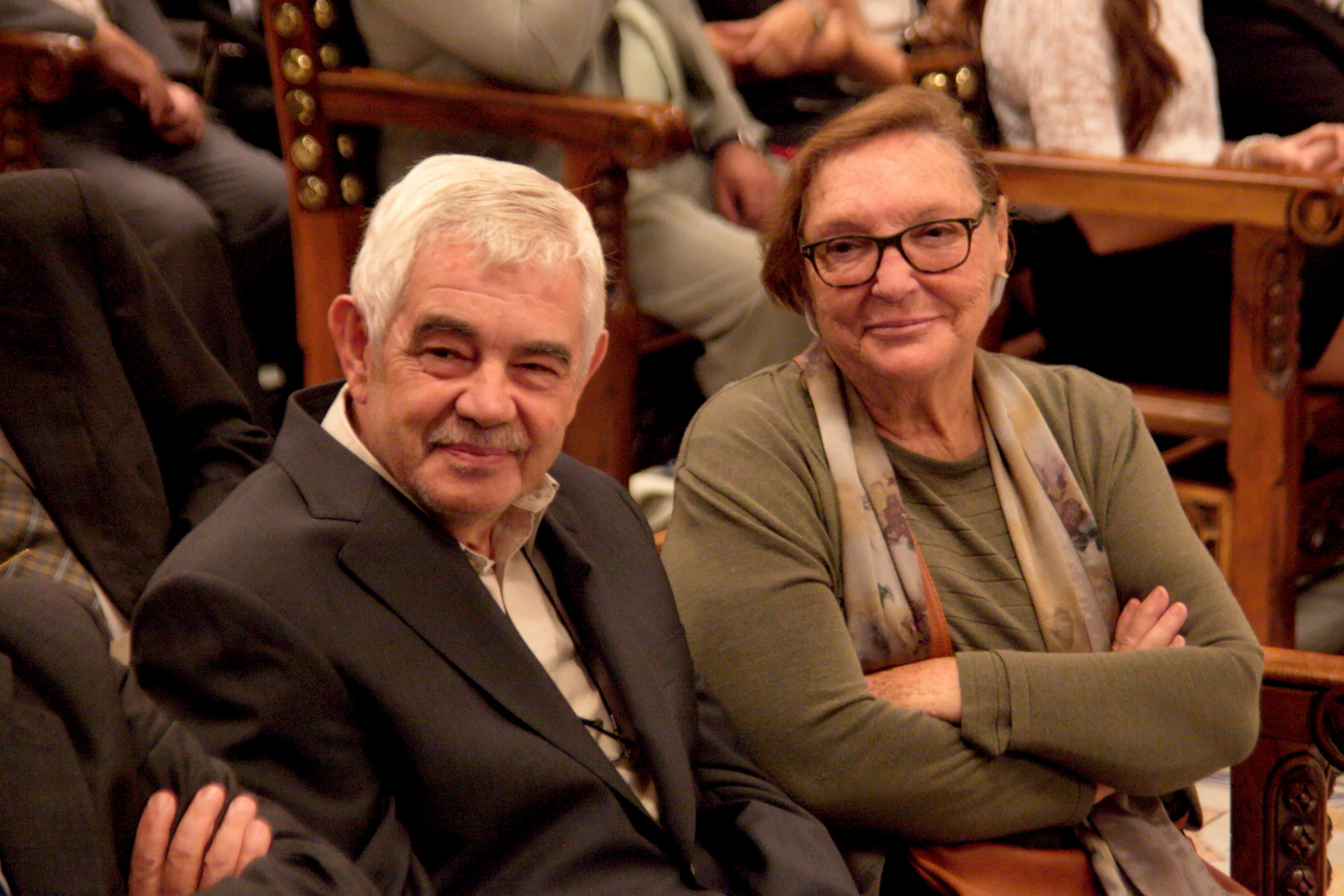 Acte de lliurament de la Medalla d'Or al Mèrit Esportiu de l'Ajuntament de Barcelona a Enric Truñó i Lagares. 6 d'octubre de 2015